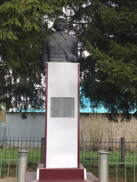 Памятник Инся